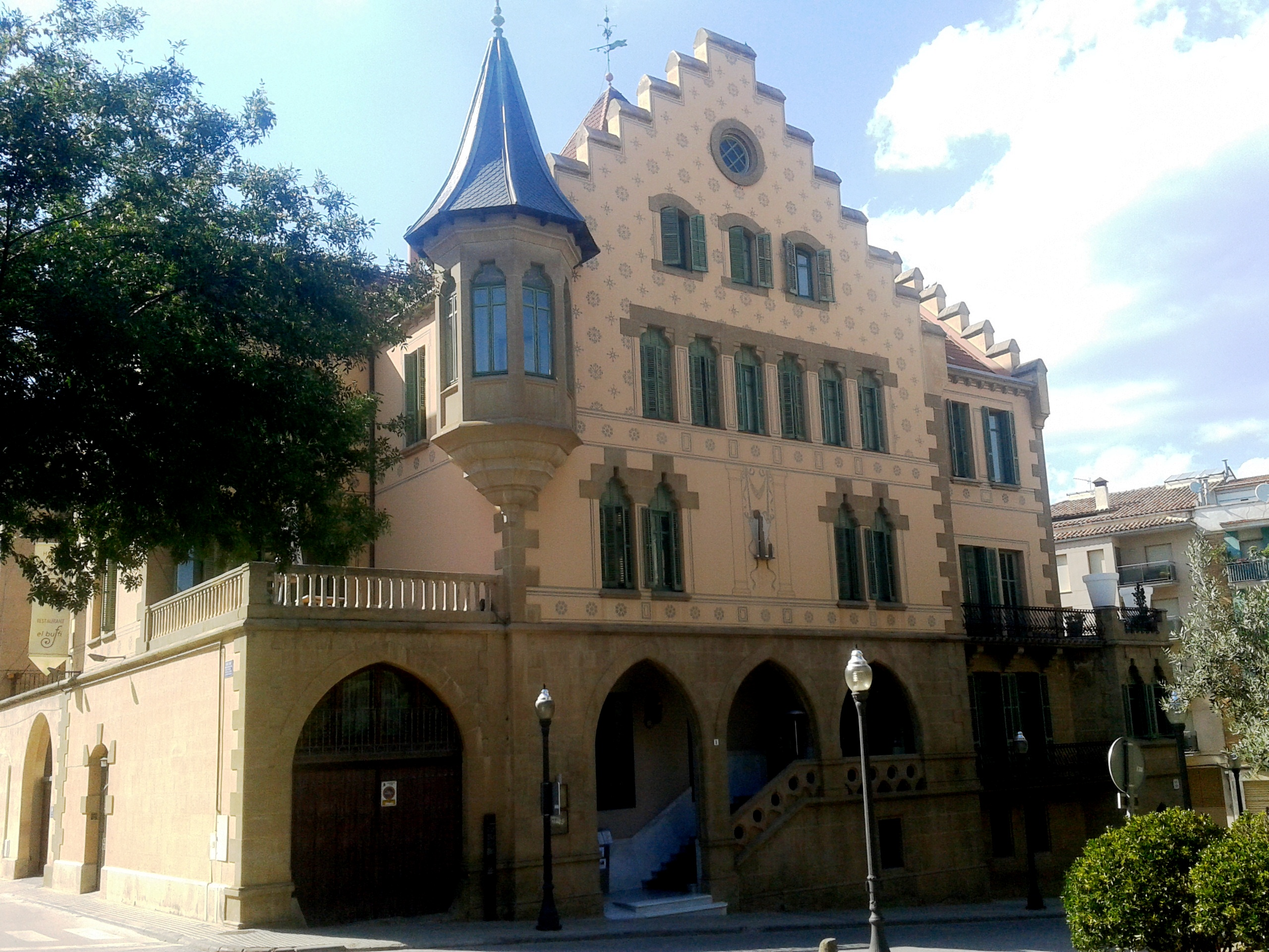 Hotel Sant Roc de Solsona. Edifici modernista catalogat com BCIL (IPA 17670)